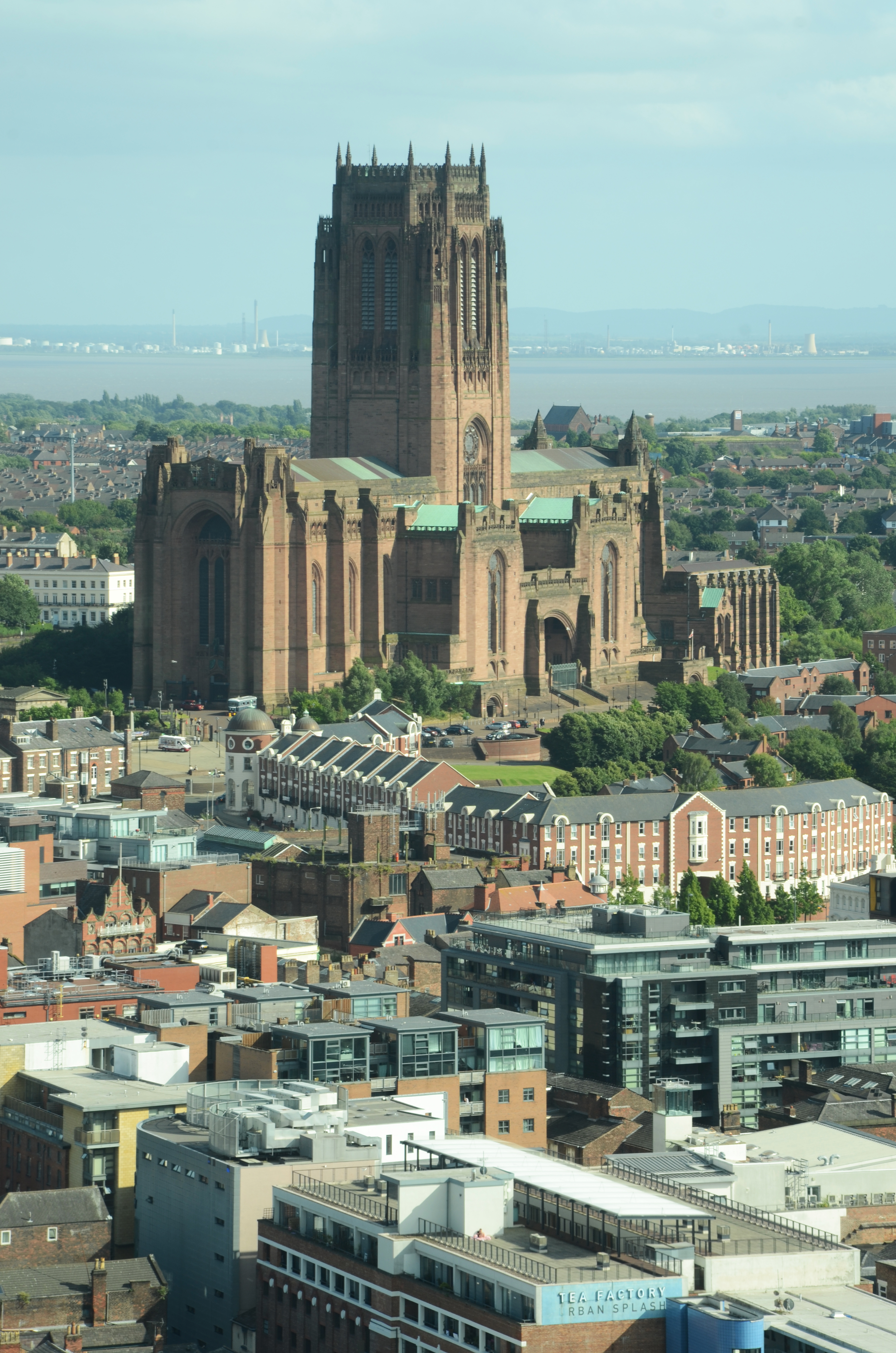 Een kathedraal vanaf de Radio City Tower in Liverpool.